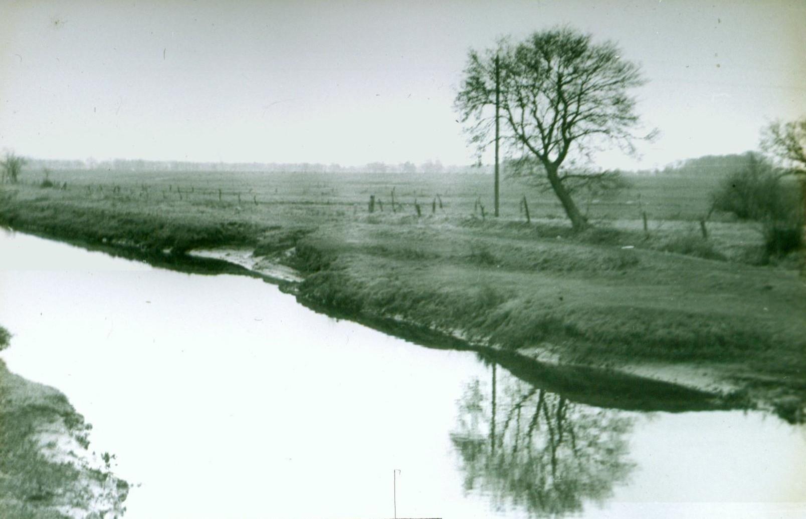 Sater-Ems, 1931